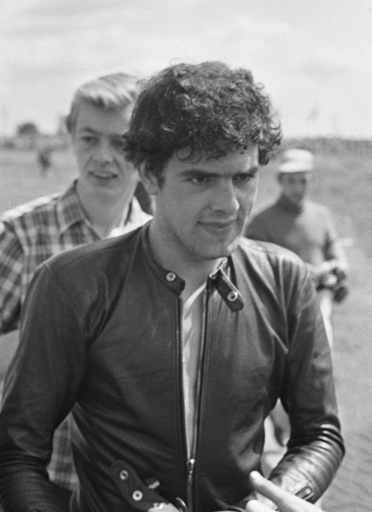 Paul Lodewijkx